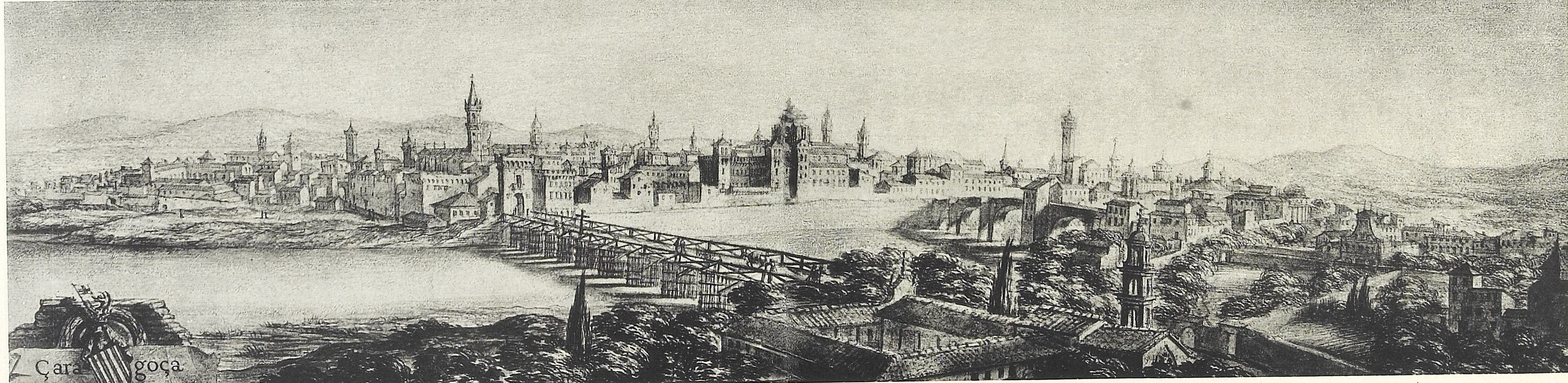 Zaragoza, acuarela de Pier Maria Baldi, Biblioteca Laurenciana de Florencia, recogida en Sánchez Rivero A, Mariutti de Sánchez Rivero A. "Viaje de Cosme de Médicis por España y Portugal (1668-1669)", Madrid: Sucesores de Rivadeneyra; 1933